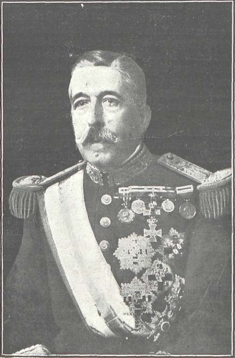 El Excmo. Sr. General de División D. Antonio Tovar y Marcoleta, recientemente promovido a este empleo.